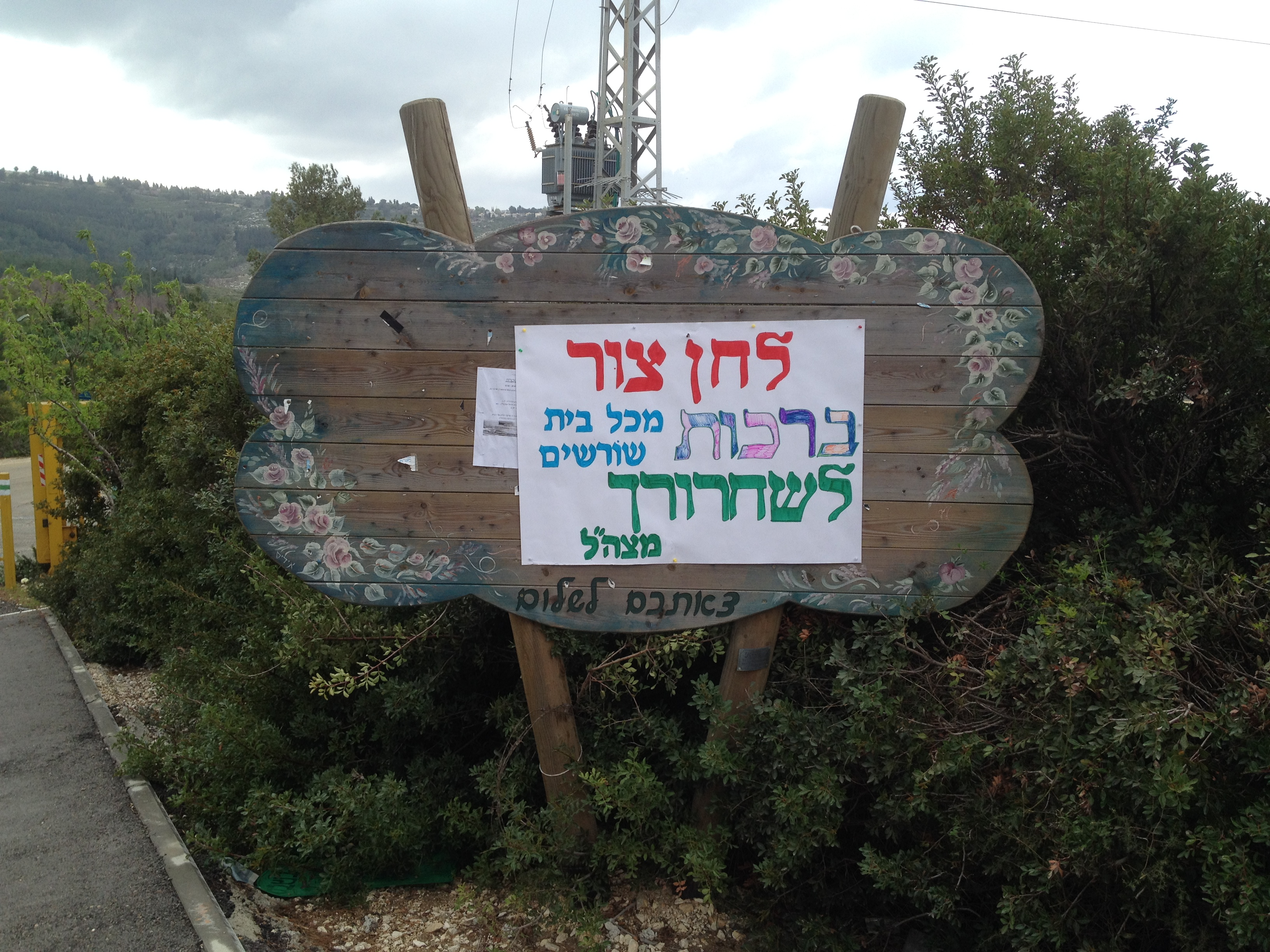 שורשים הוא יישוב קהילתי בגליל התחתון בתחומי המועצה האזורית משגב